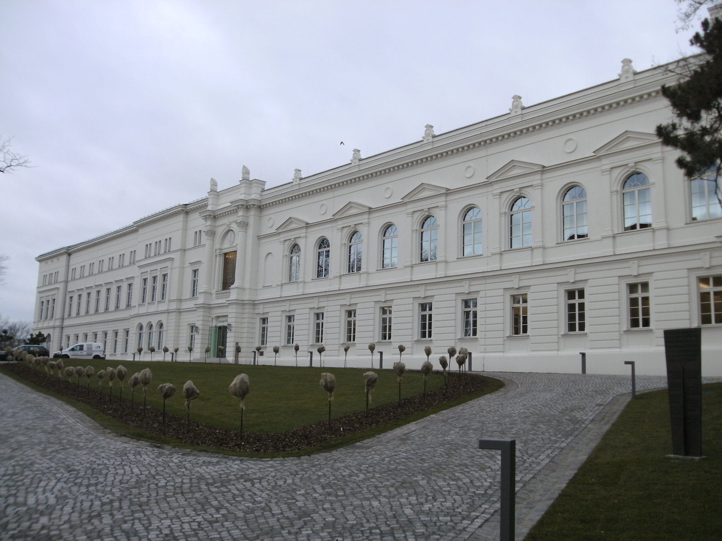 LeopoldinaHausHalle